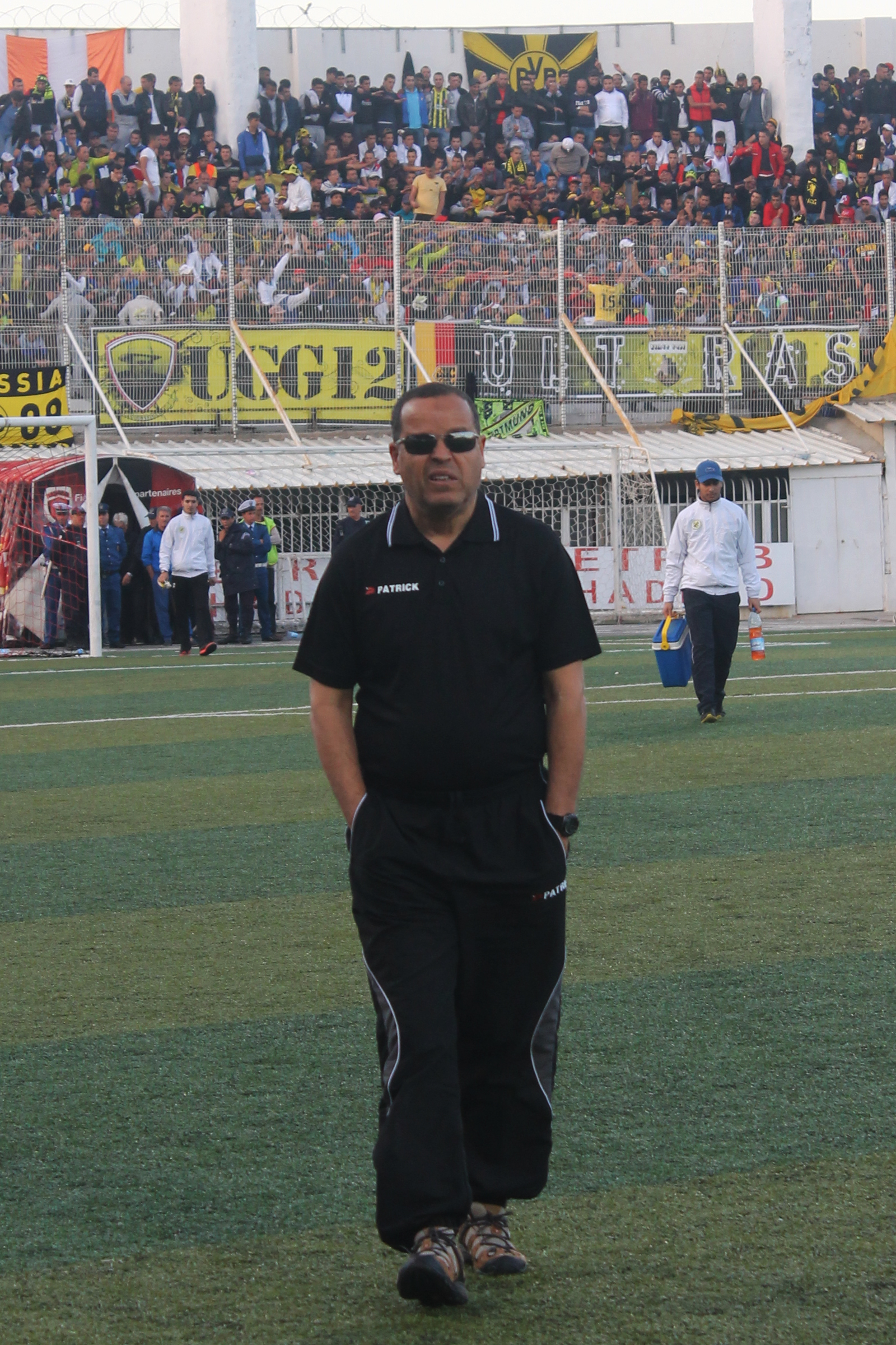 Boualem Charef, entraîneur de l'USM El Harrach, lors du match contre l'USM Alger au stade Omar-Hamadi, pour le compte de la 19e journée de Ligue 1 Mobilis 2013/2014.